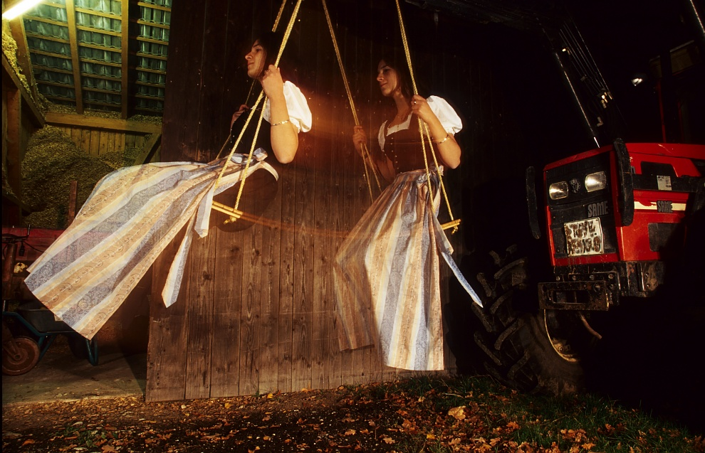 Beispiel für Mischlicht, Langzeitbelichtung mit doppelter Blitzauslösung